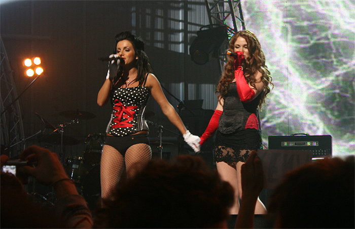 Zespół Tatu na Viva Comet 2008